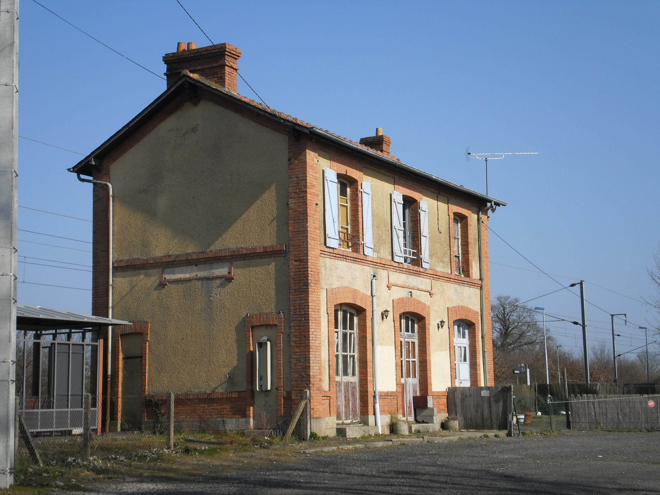 Massérac (Loire-Atlantique, France) - gare